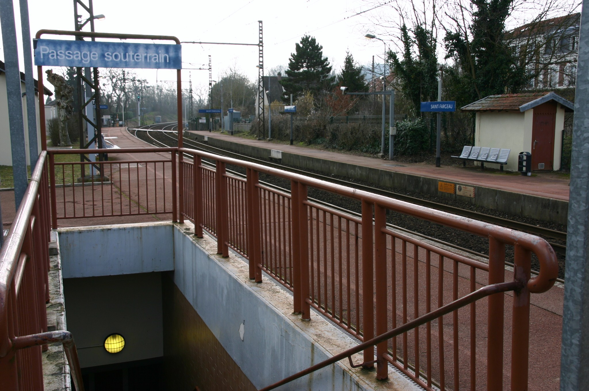 La gare de Saint-Fargeau, Saint-Fargeau-Ponthierry, département de la Seine-et-Marne (France)